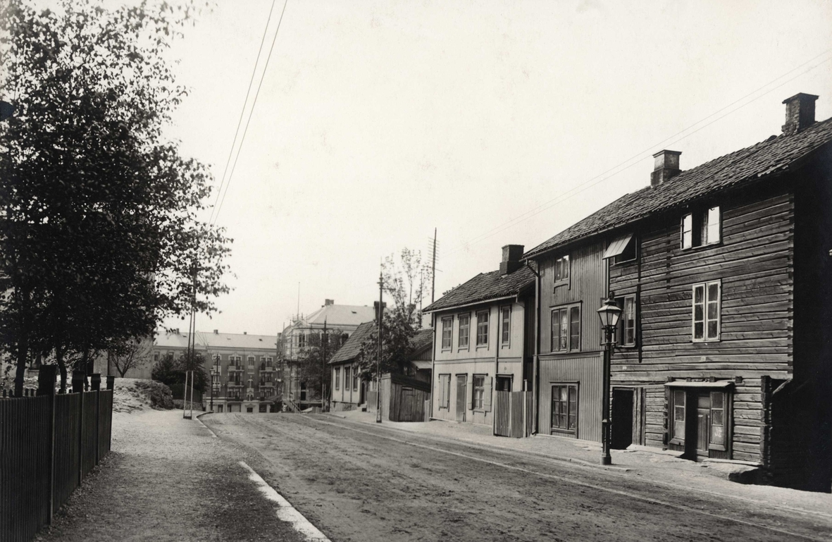 Nedover Briskebyveien mot Riddervolds plass. Det laftede huset er Briskebyveien 28 (laftet), så følger nr. 26, 24 og 22. Skjult bak det siste er nr. 8 og 6, og murbygningen deretter er Niels Juels gate 51. Deretter følger Skovveien 29 og Riddervolds gate 12. Foto: Tannlege Jensen, 27-05-1897. Fra Byhistorisk samling hos Oslo Museum.